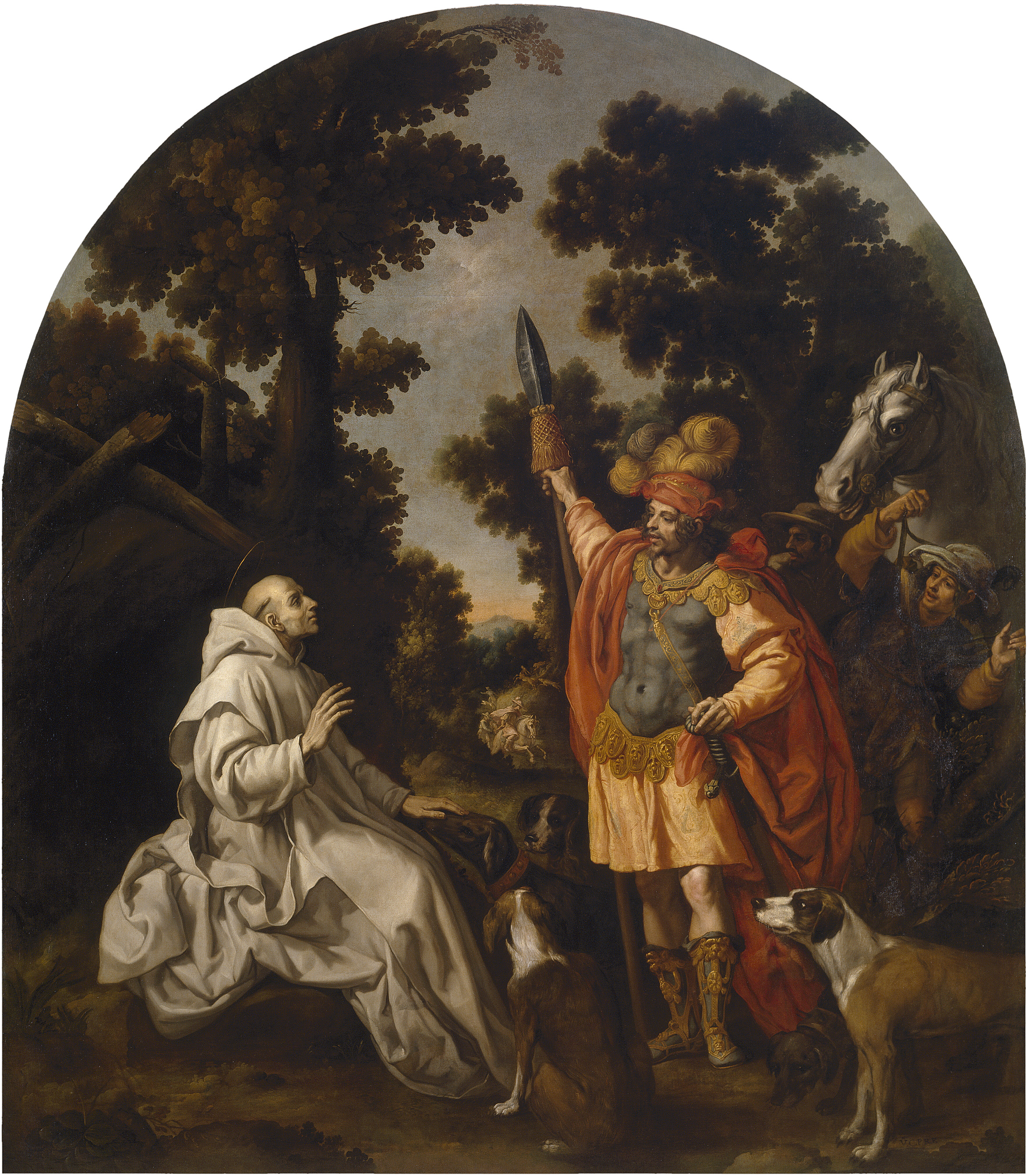 Encuentro de san Bruno a Roger I de Sicilia.label QS:Les,"Encuentro de san Bruno a Roger I de Sicilia."